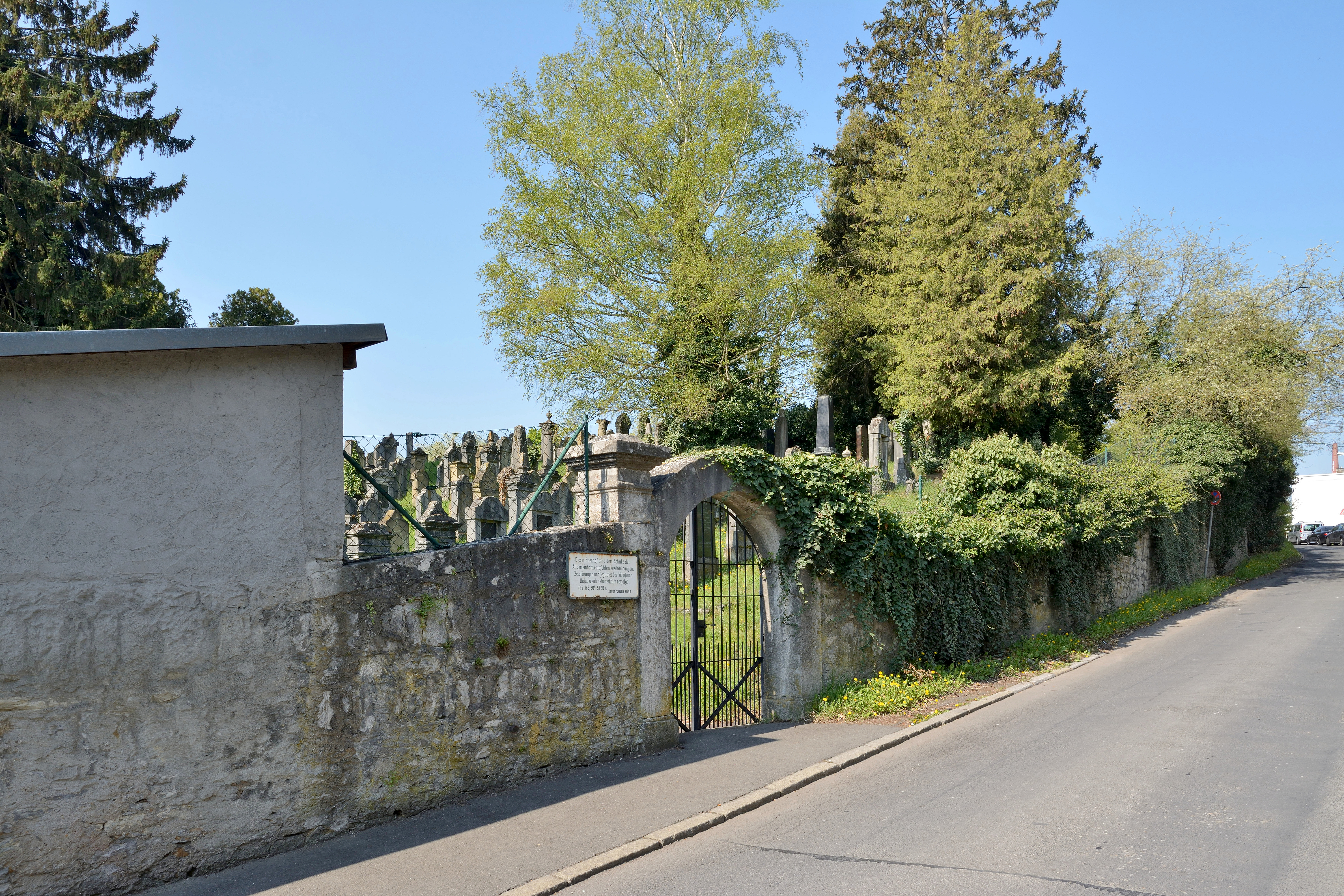 Impressionen vom Jüdischen Friedhof in Heidingsfeld (Würzburg). Der Friedhof war verschlossen und nicht zugänglich, Wege waren nicht zu erkennen.